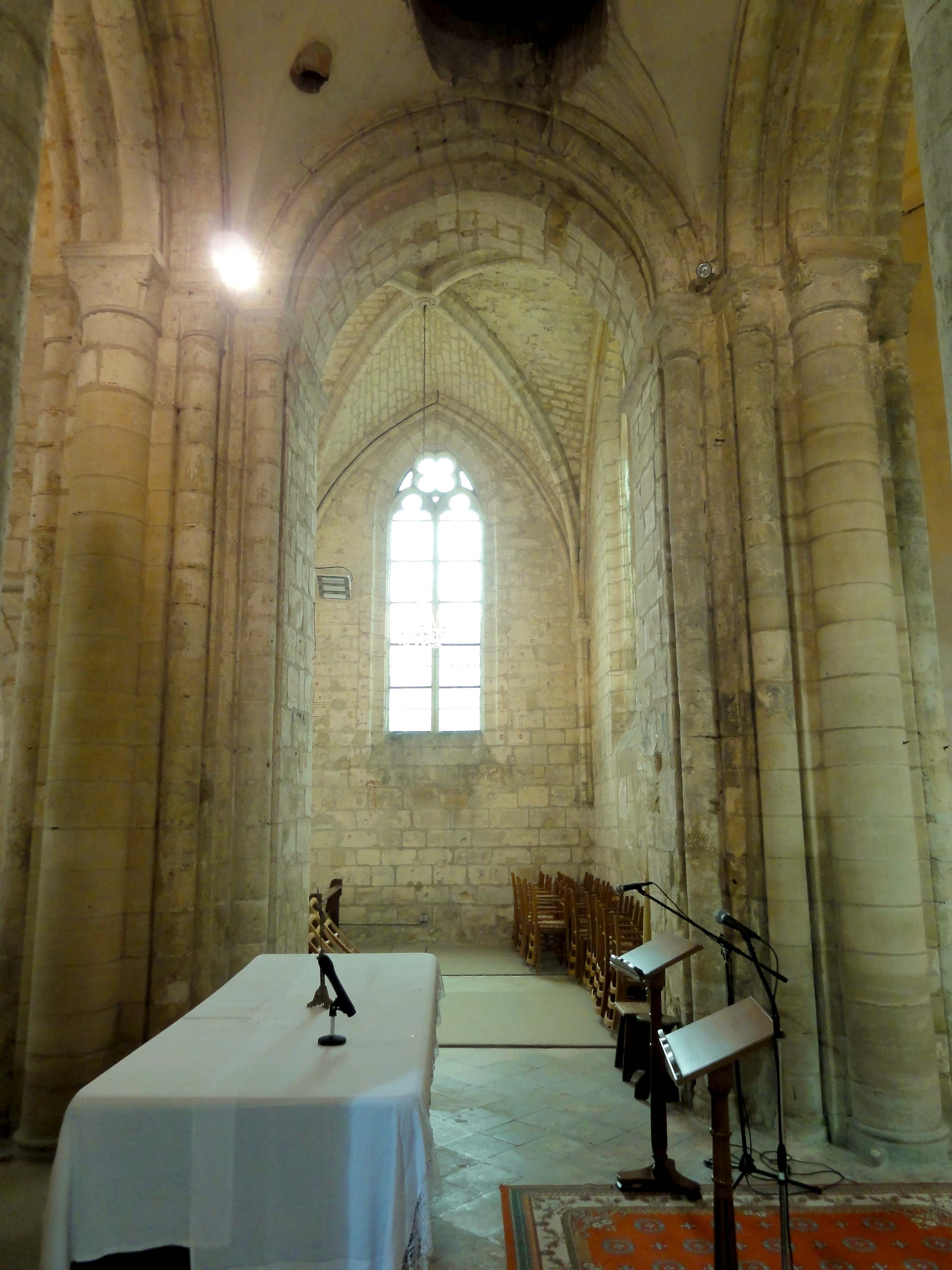 Intérieur de l'église (voir titre).